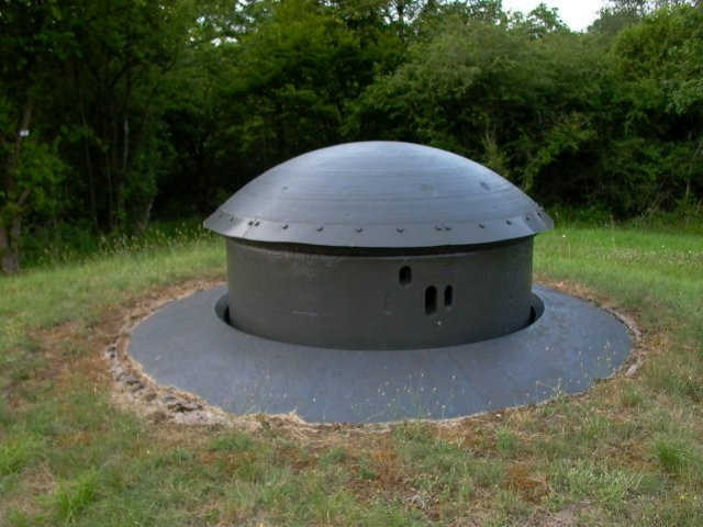 Zdjęcie przedstawia znajdującą się w pozycji bojowej wieżę pancerną dla karabinów maszynowych w Grupie Warownej "Hackenberg" Linii Maginota. Autor: Zbigniew Strucki